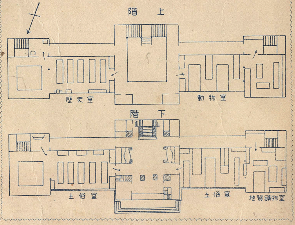 中文（台灣）: 1933年臺灣總督府博物館（現國立臺灣博物館）館內構造圖